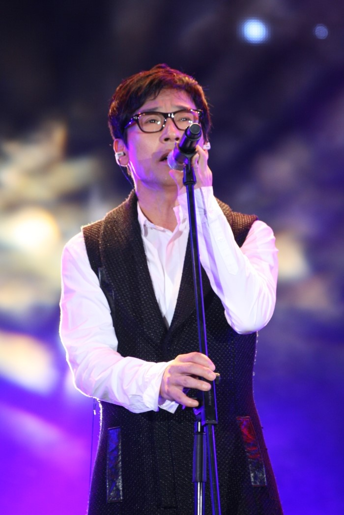 가수 조관우